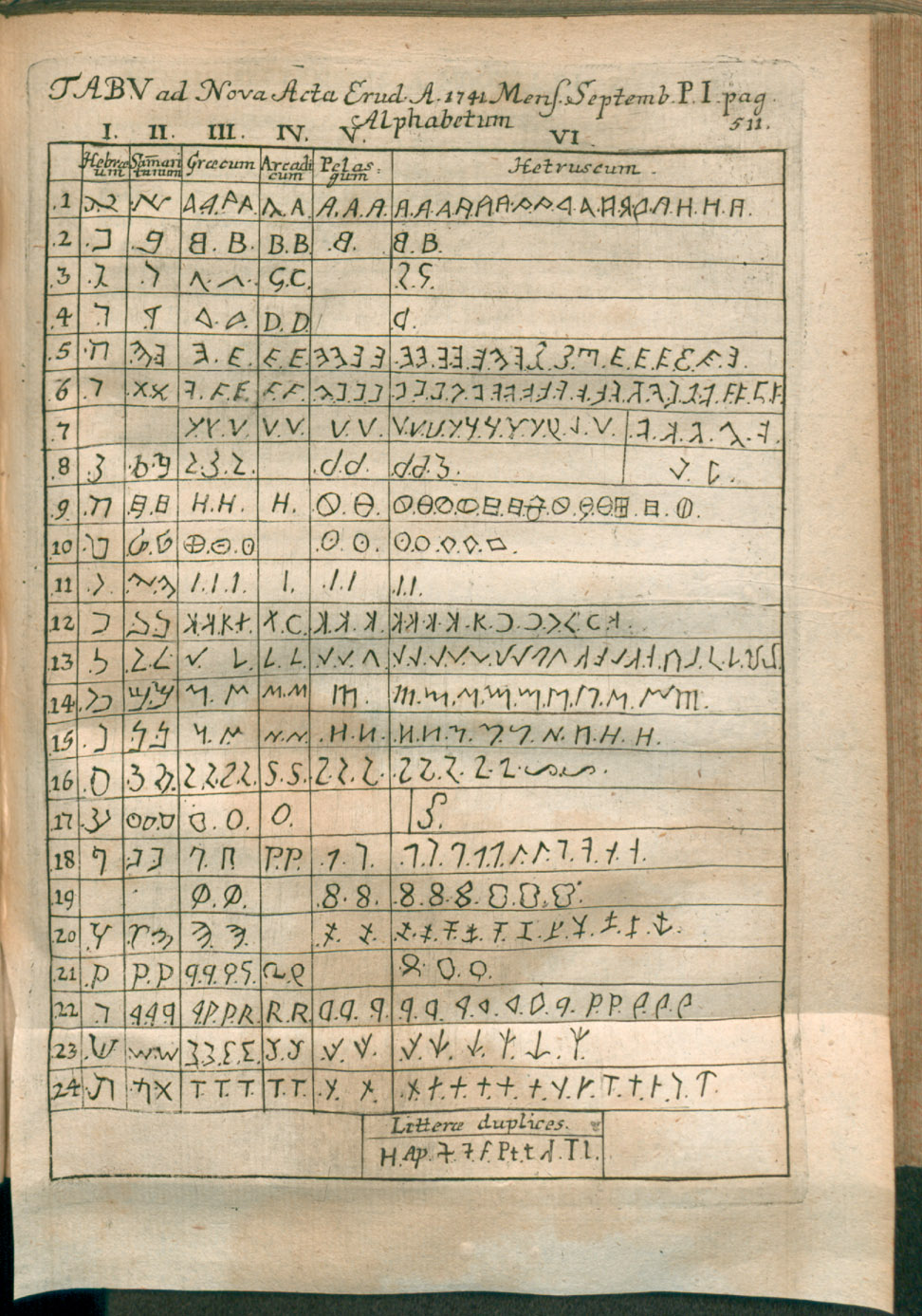 Illustration